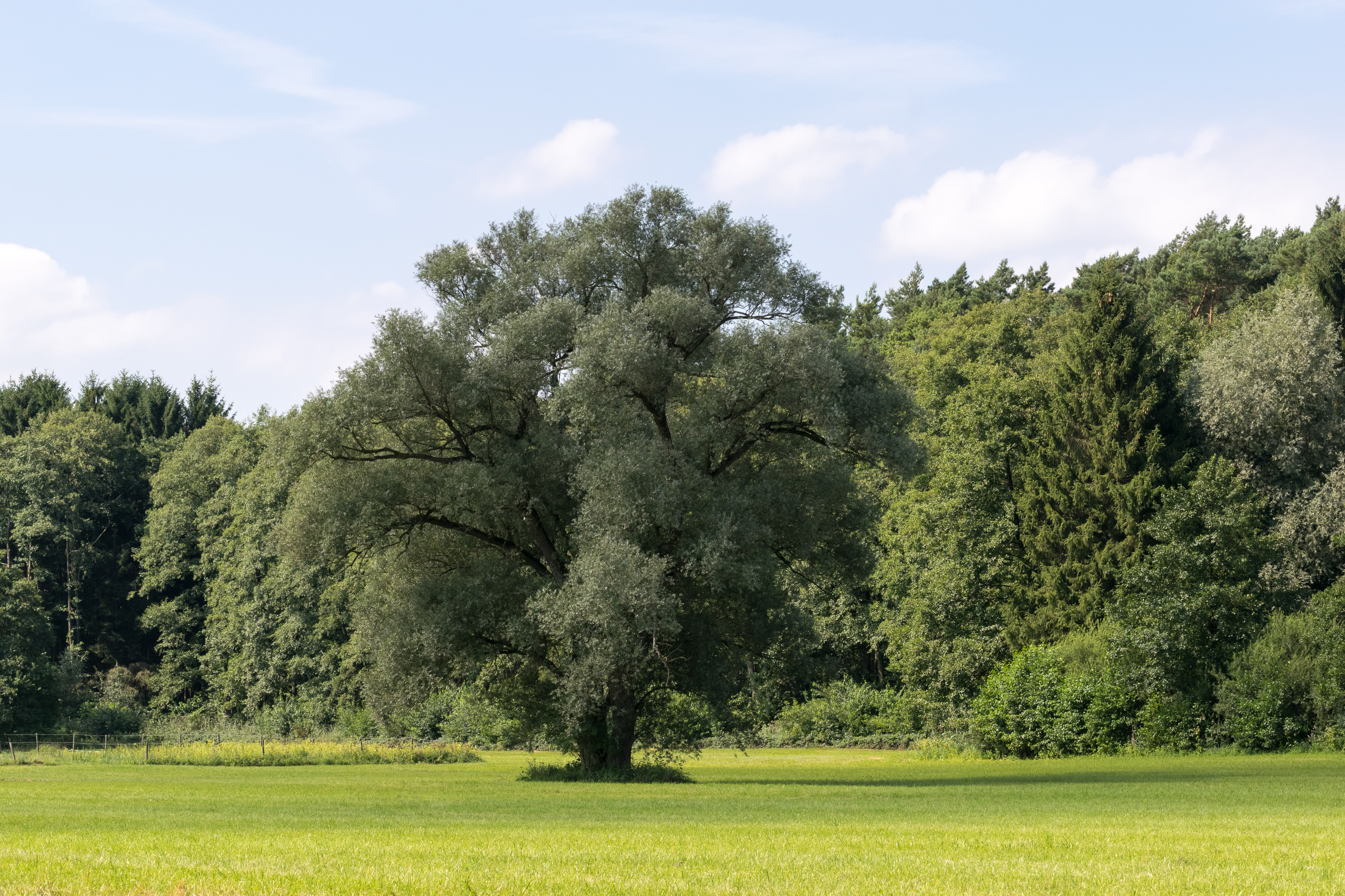 Naturschutzgebiet "Strothe-Niederung", Schlangen, Kreis Lippe